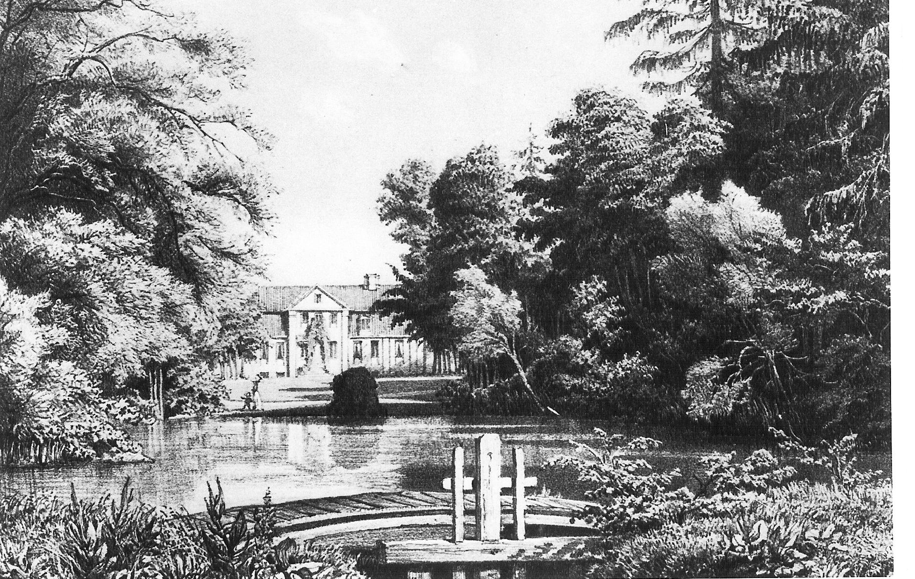 Herrenhaus Wellingsbüttel ungefähr 1850. This is a photograph of an architectural monument.